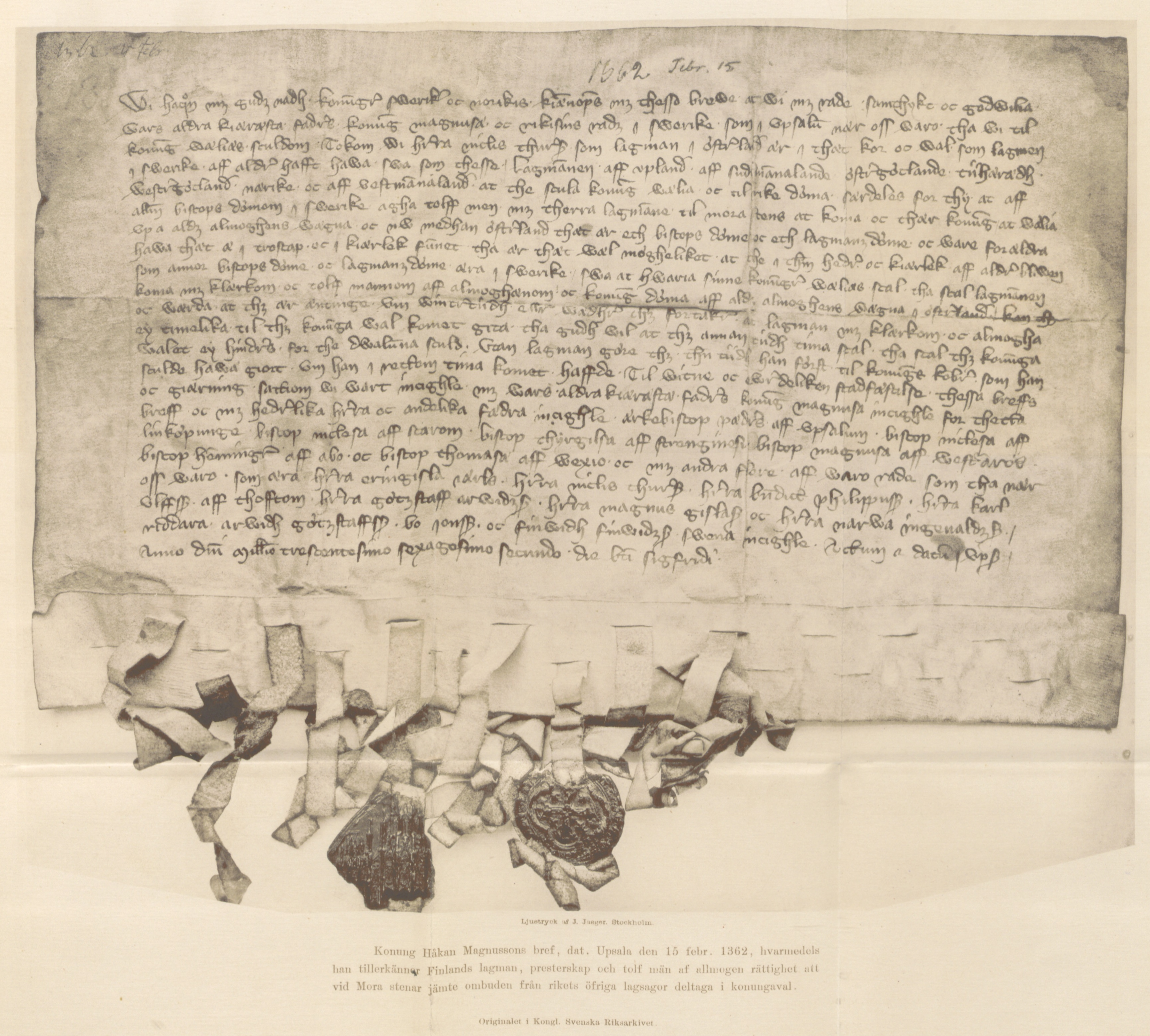 Am 15. Februar 1362 verlieh König Magnusson an Finland das Recht, gleichberechtigt an der Königswahl teilnehmen zu dürfen.